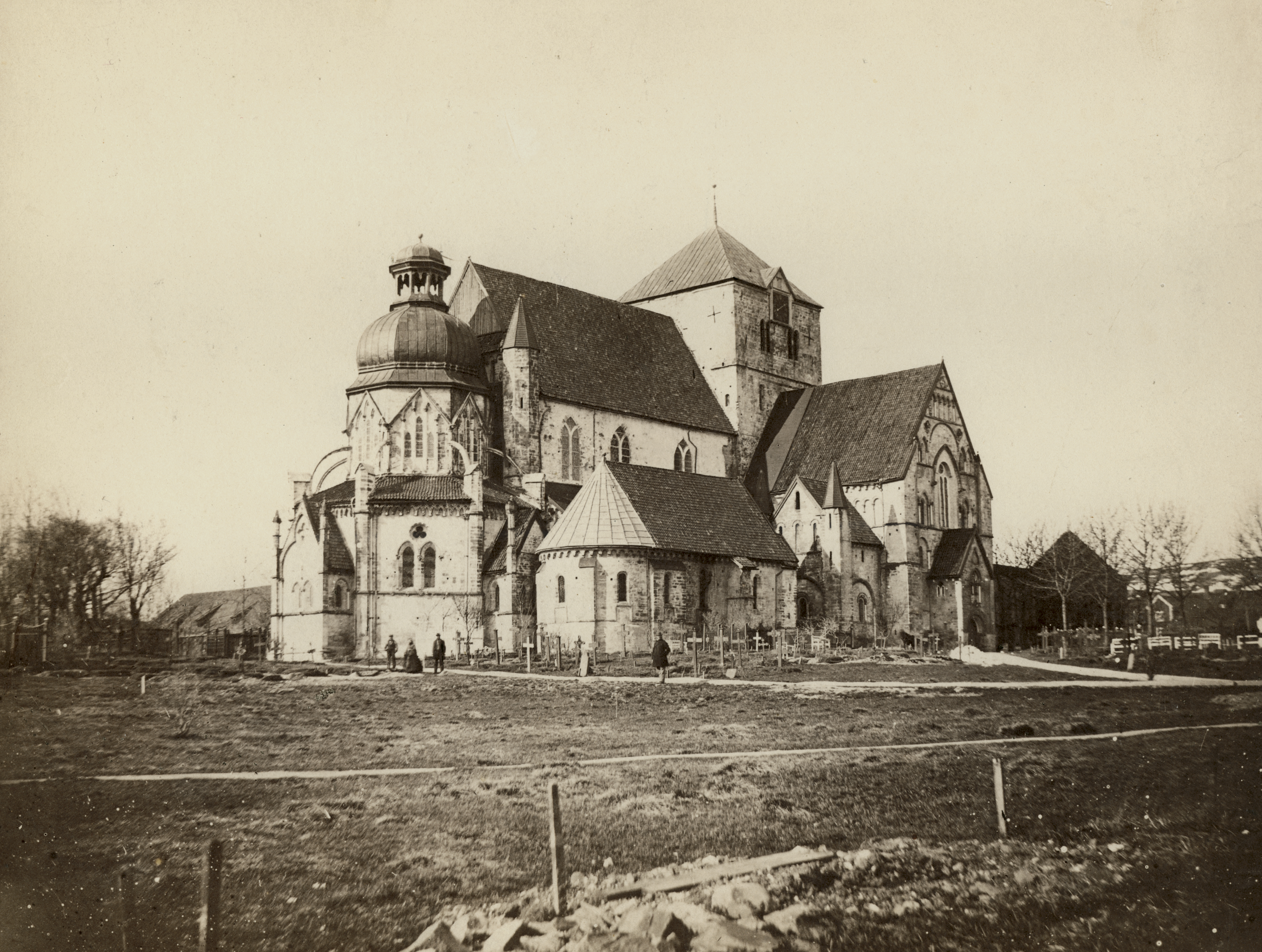 Nidaros domkirke i Trondheim, Sør-Trøndelag Bildet er tatt før 1869 da restaureringen startet.